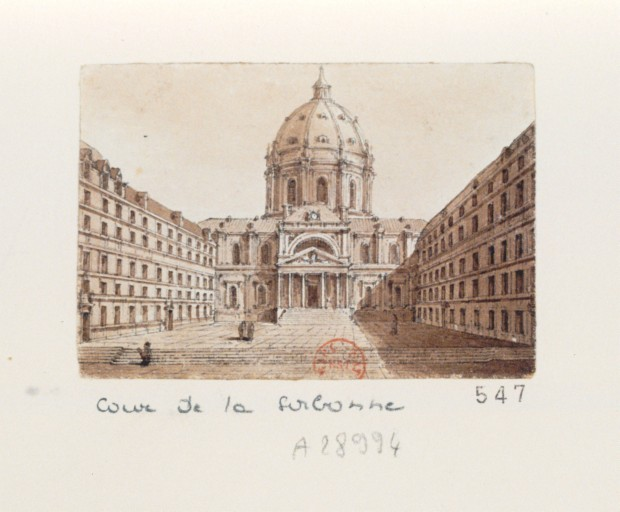 La cour de la Sorbonne par Christophe Civeton (1796-1831)